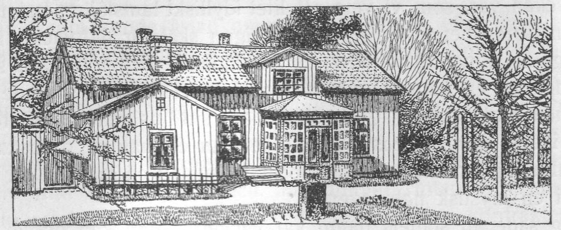 Landeriet Lyckan i Göteborg efter teckning av Ingegred Risberg.